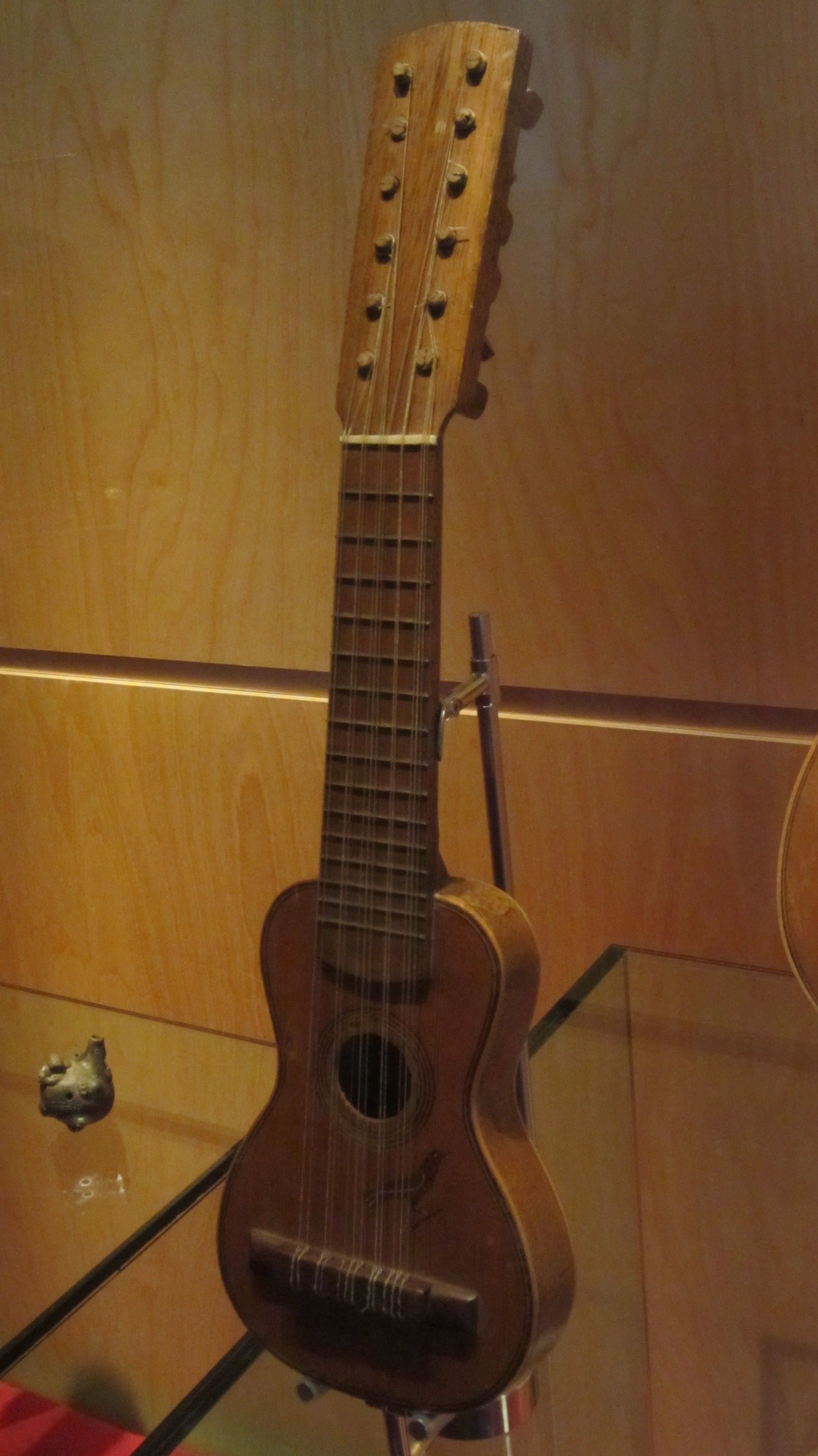 Chillador. Bueno, Cuzco (Perú) 1960 - 1965 MDMB 825, Museu de la Música de Barcelona